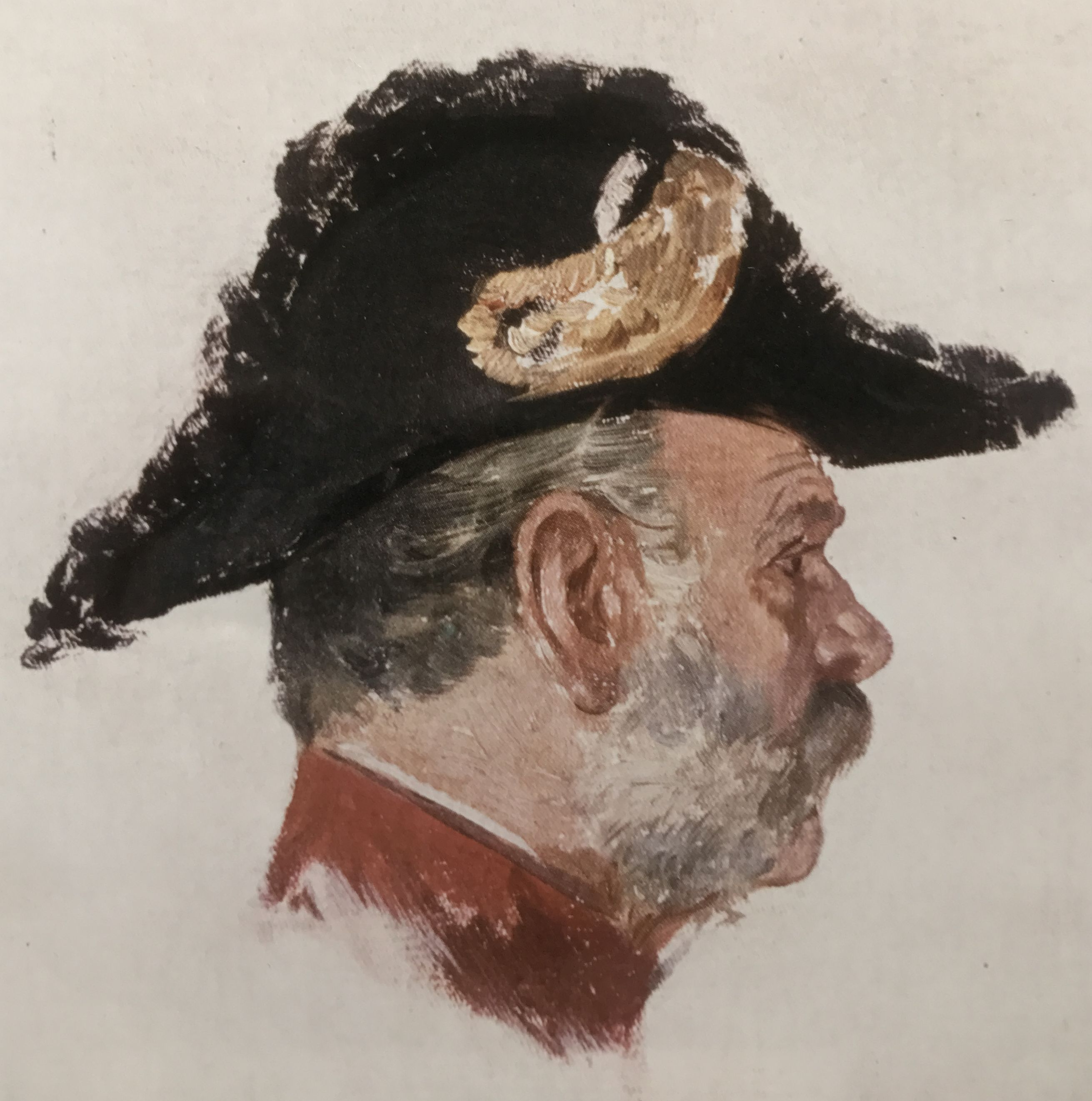 Oberstallmeister Fedor von Rauch, Fedor von Rauch: Briefe aus dem großen Hauptquartier 1866 u.1870-71, Berlin, 1911. Mitteilungen des Vereins für die Geschichte Berlins, Bände 24-26, 1907, S. 63ff.